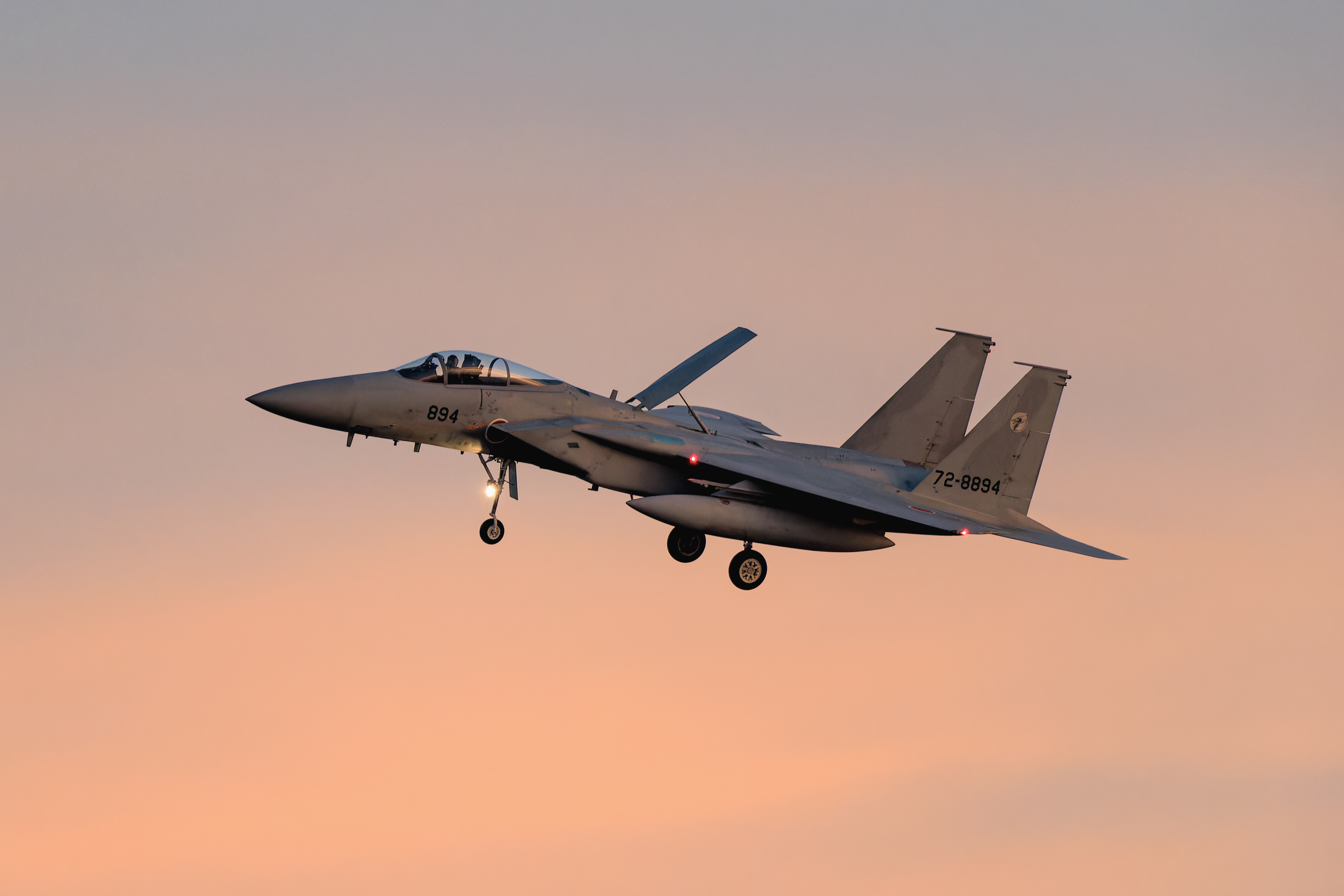 航空自衛隊松島基地 第303飛行隊の、F-15J要撃戦闘機